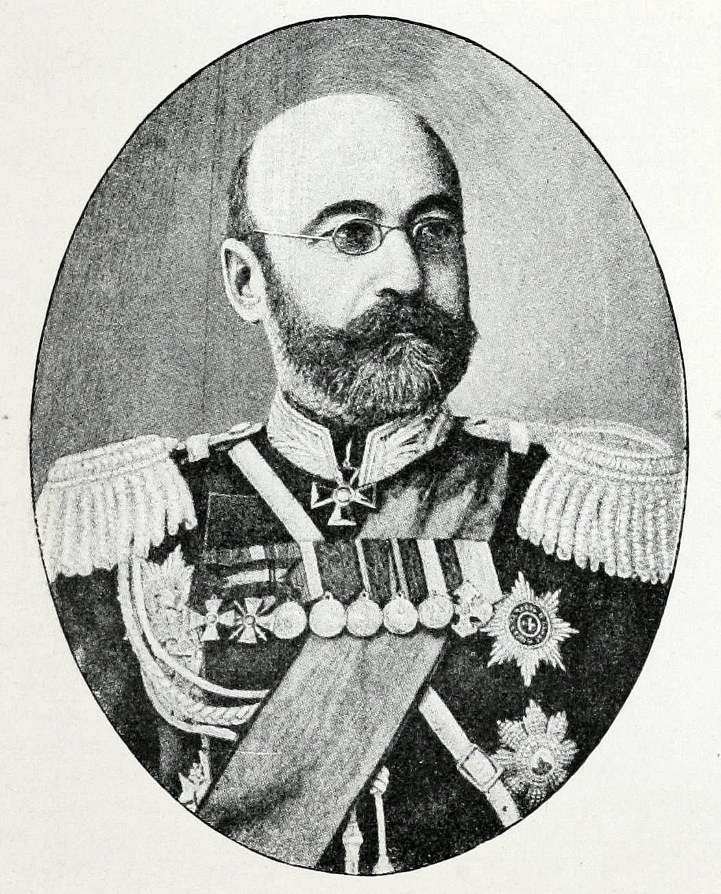 Это изо было использовано в статье «Гродеков, Николай Иванович» опубликованной в восьмом томе «Военной энциклопедии», который был издан книгоиздательским товариществом И. Д. Сытина в 1912 году в столице Российской империи городе Санкт-Петербурге.